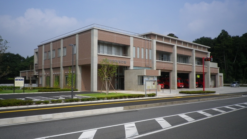 千葉市若葉消防署